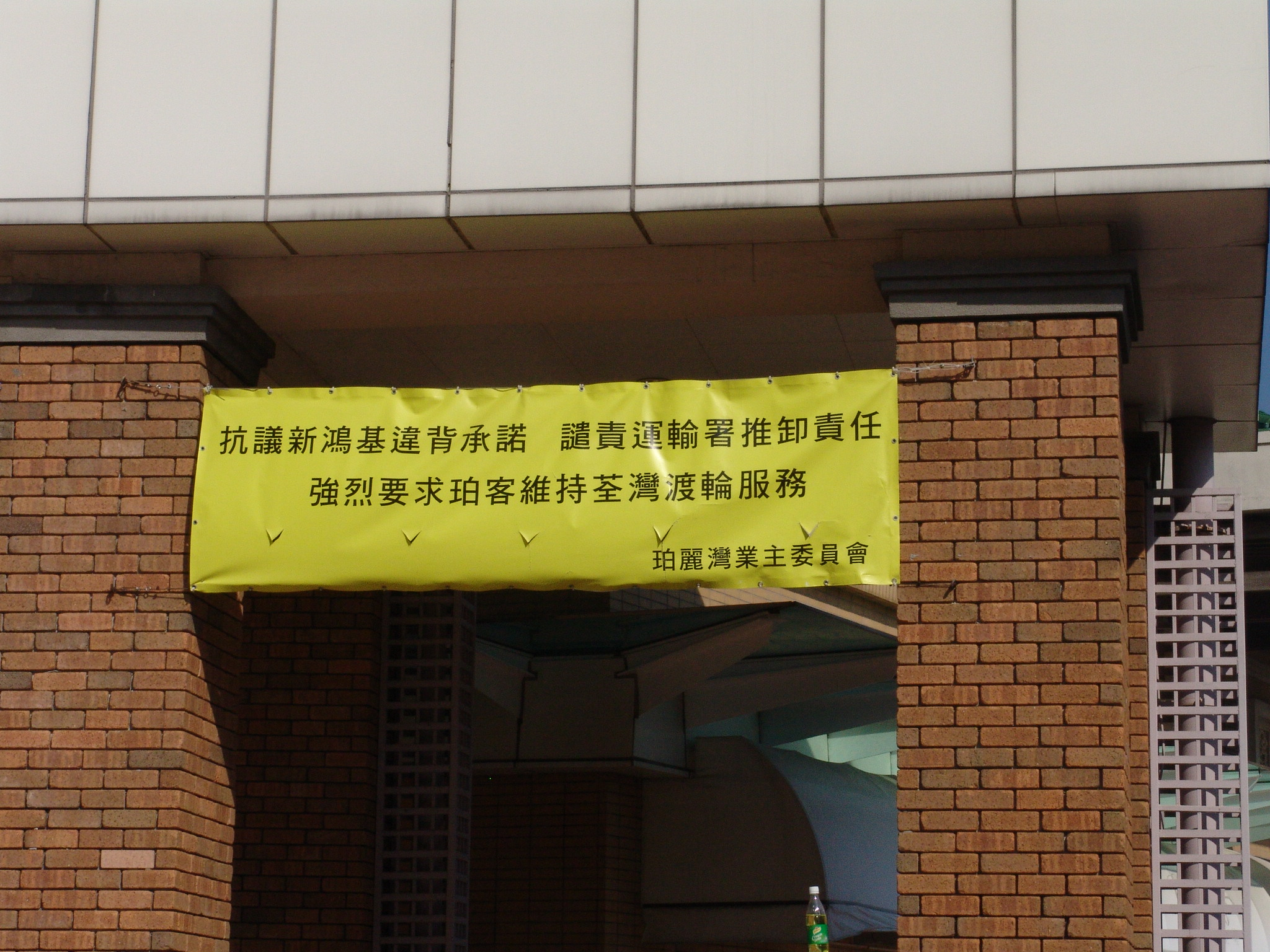 珀丽湾居民抗议渡轮公司取消往来珀丽湾至荃湾的航线